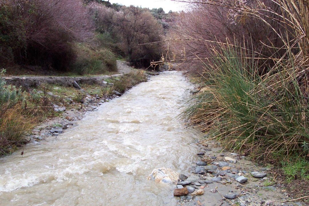 El río Alcolea Río de Alcolea de Almería Fotografía realizada por José Manuel Escudero, febrero de 2003.